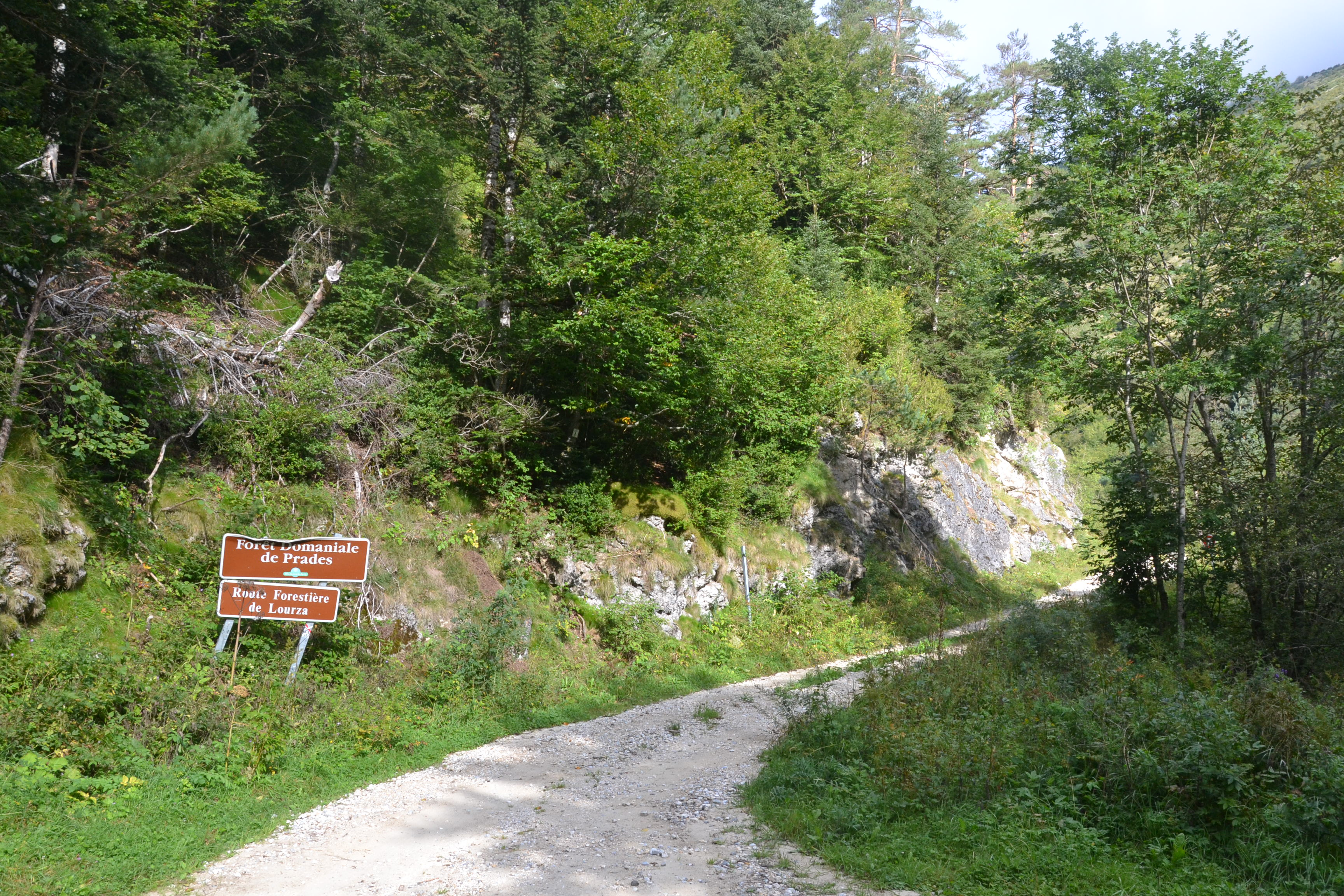 Panneaux de la route forestière de Lourza et de la forêt domaniale de Prades (Ariège, France).